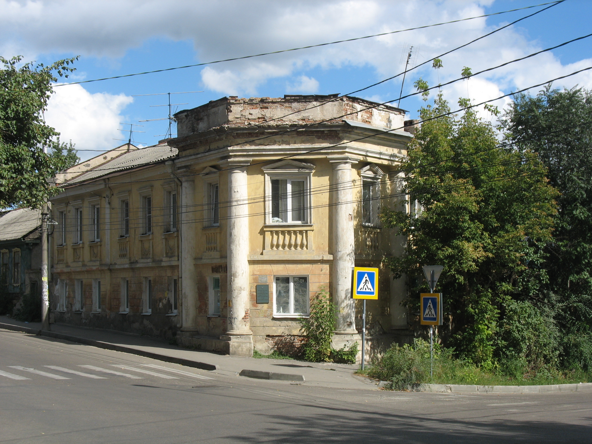 Жилой дом Трушевского: улица Коммунаров, 44, Воронеж, Воронежская область